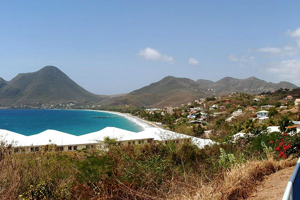 Commune du Diamant (Martinique). En arrière plan, le Morne Larcher